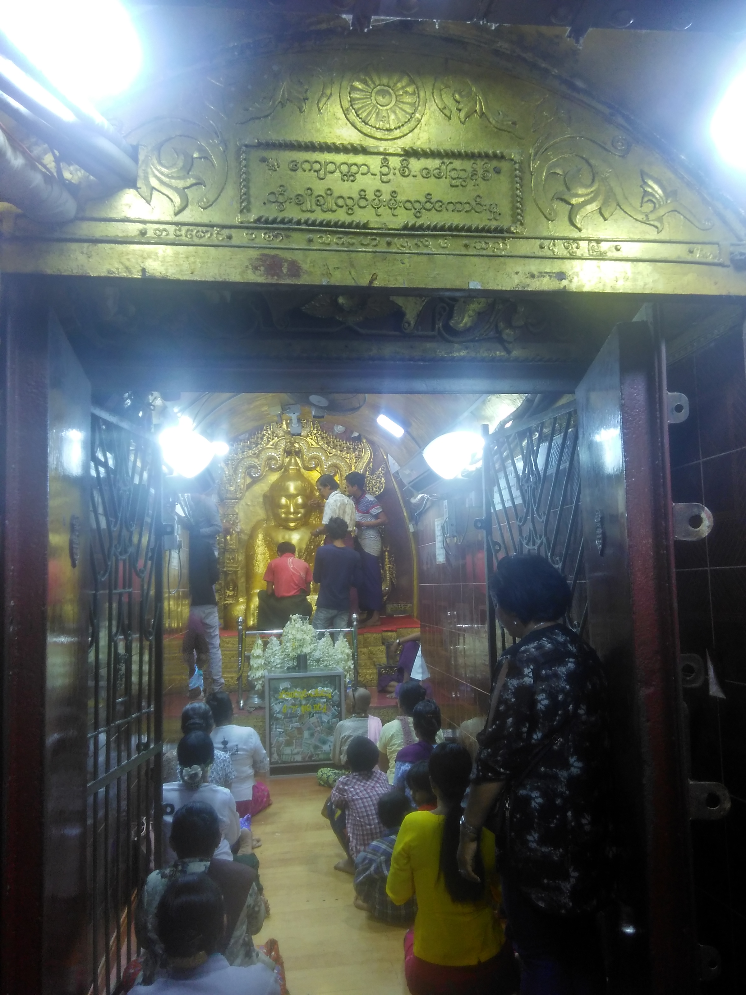 မြန်မာဘာသာ: ရွှေဂူနီဘုရား၊ ကျောက္ကာရွာ